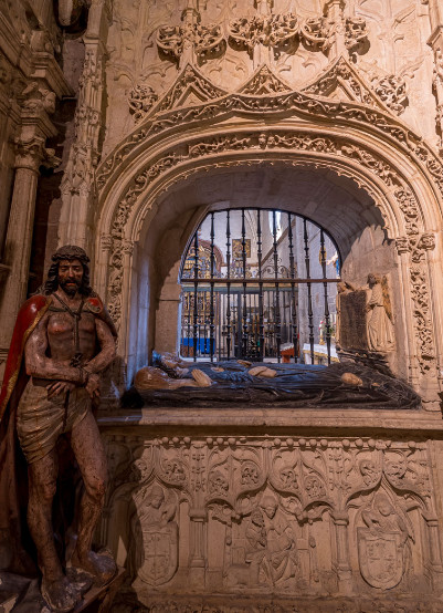 FranciscoGarciadeBurgosyCatalinaPolancoIglesiadeSanGilAbadBurgos